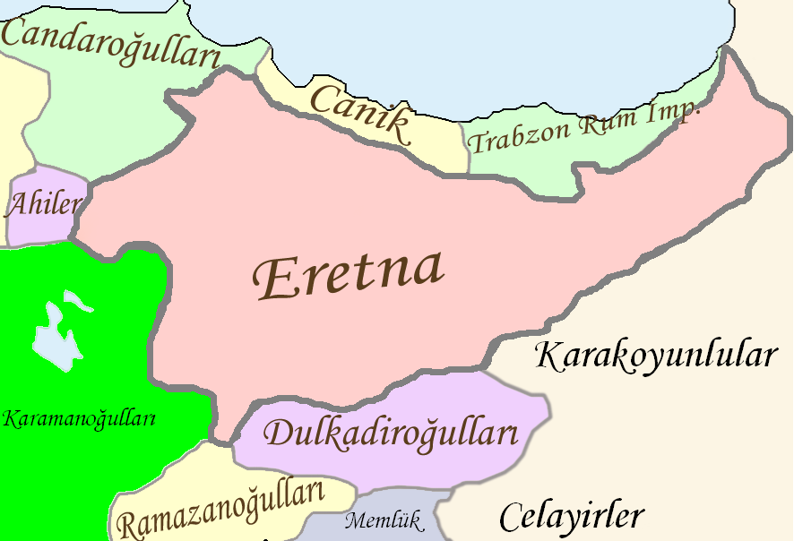 Eretna Beyliği'nin konumu